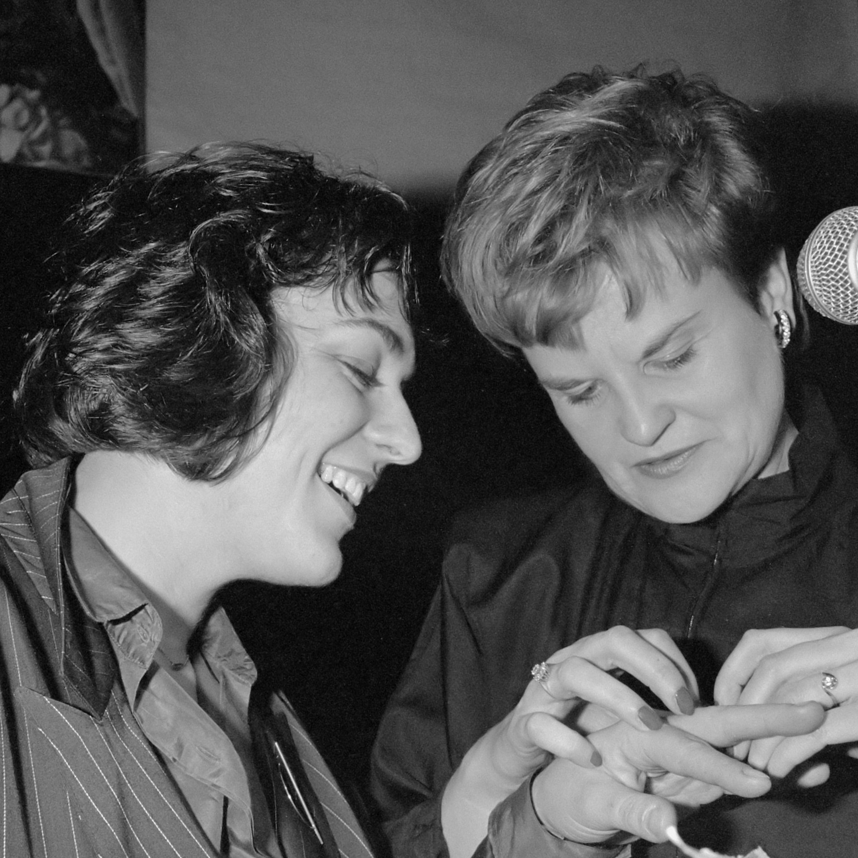 Harriet Freezerring en Annie Romeinprijs uitgereikt aan respectievelijk Lola Verkuil en Anja Meulenbelt. Lola Verkuil (l) ontvangt ring van Cisca Dresselhuys, hoofdredactrice van het feministische maanblad Opzij 17 december 1987